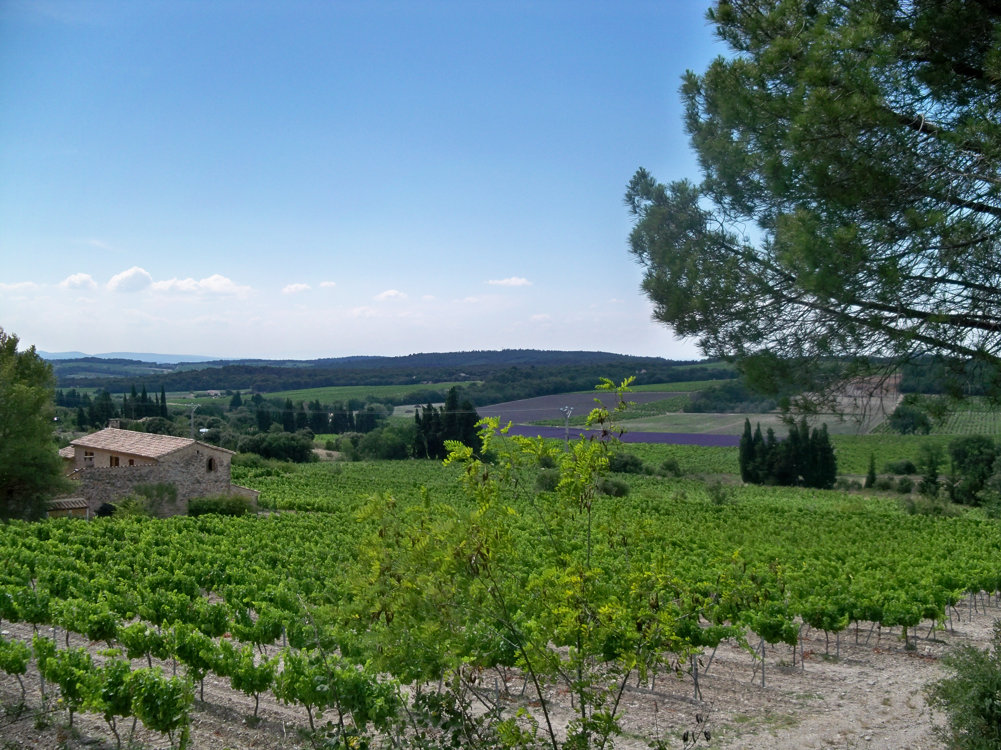 Vignoble vauclusien du Massif d'Uchaux